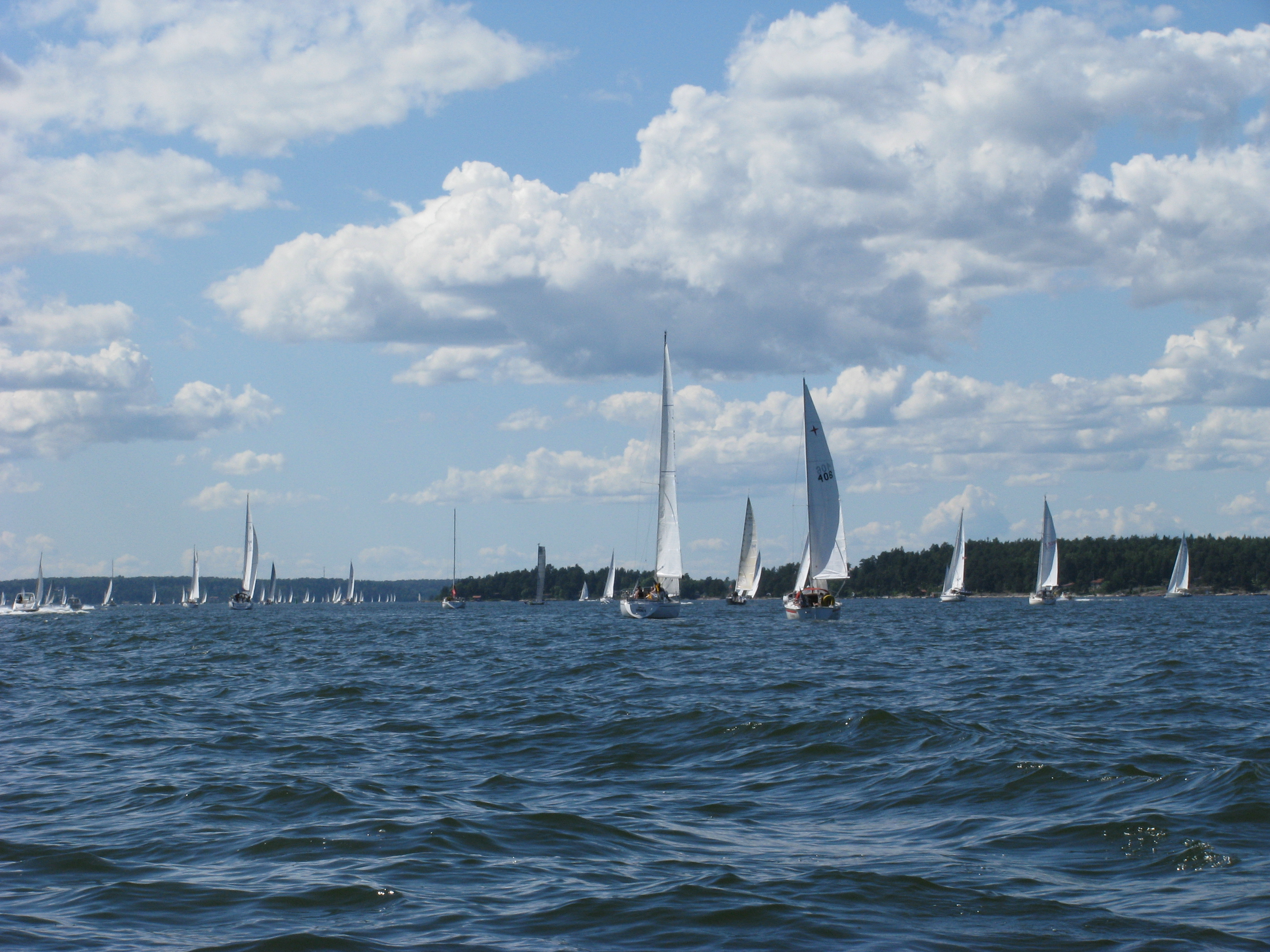 Västra saxarfjärden i Stockholms skärgård. Källa: Eget foto, fotograf EnDumEn, 27 juni 2010